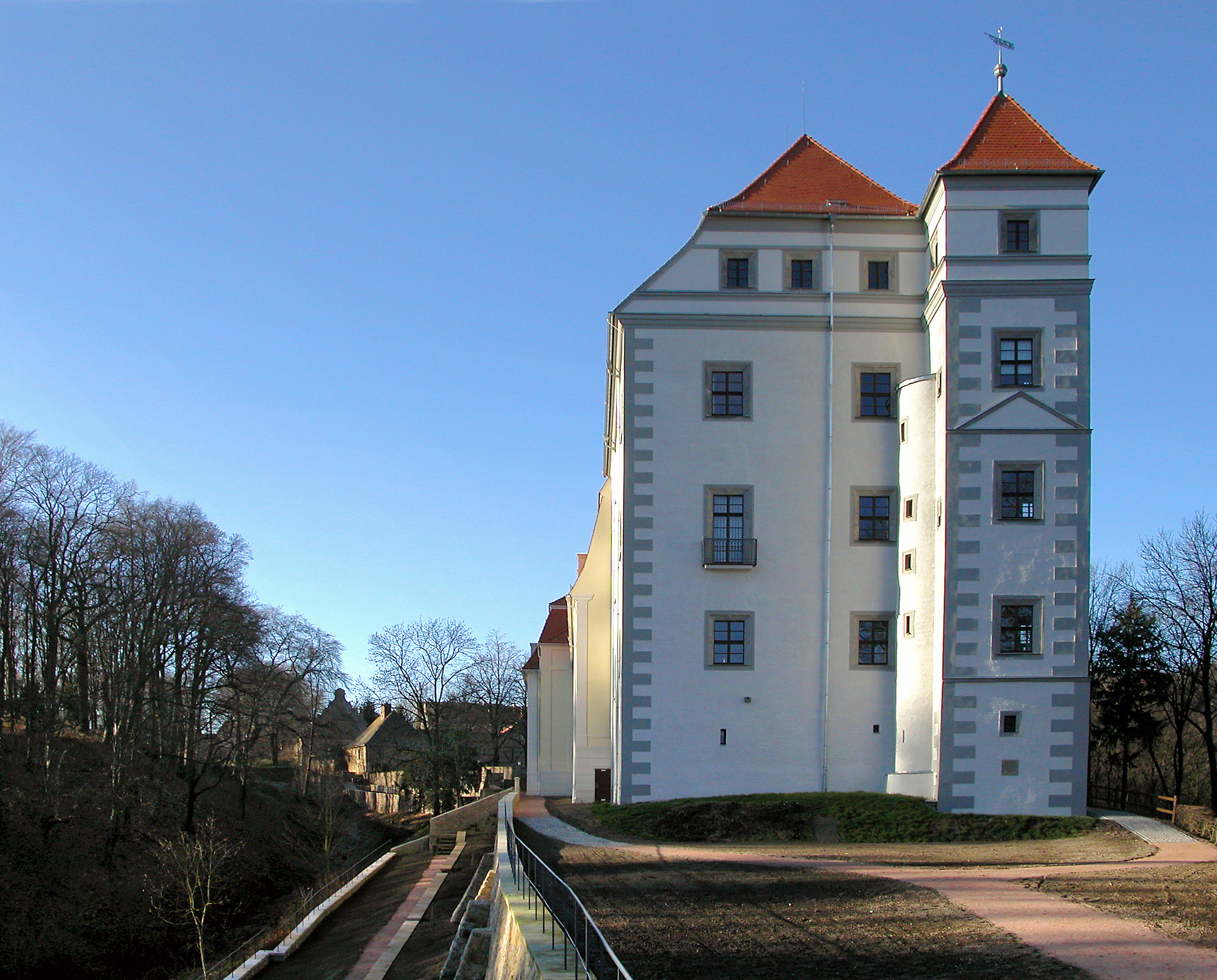 16.01.2005 01662 Meißen-Siebeneichen: Schloß Siebeneichen. Vierflügelanlage. Ältere Teile um 1550, spätere Anbauten 1745. Sicht von Südosten. Als Bildungsstätte genutzt. [DSCN5815.TIF]20050116660DR.JPG(c)Blobelt